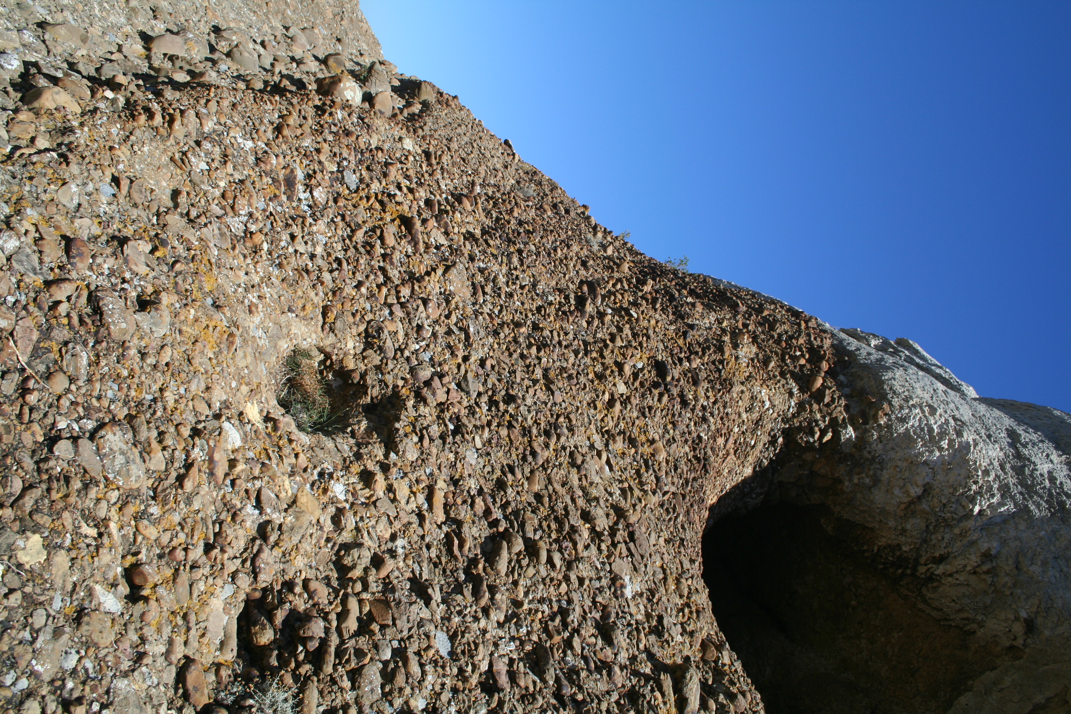 Photo prise par mes soins dans les collines au nord de La Ciotat Licence libre